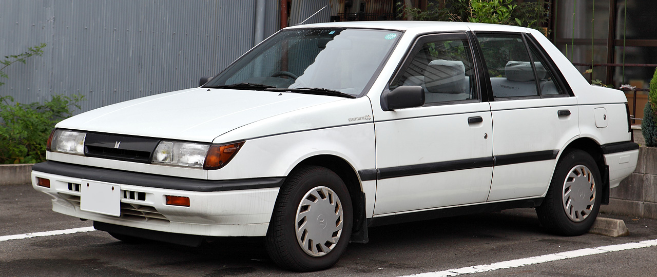 Second generation Isuzu Gemini.